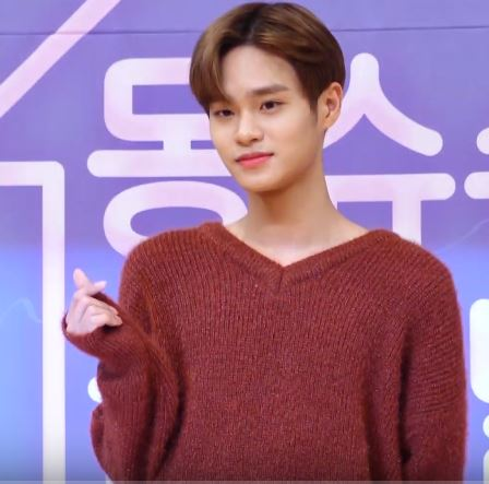 SBS 모비딕 숏폼 드라마 '몽슈슈 글로벌 하우스(이하 '몽글스')제작발표회가 8일 오후 서울 양천구 목동 SBS에서 열렸다.